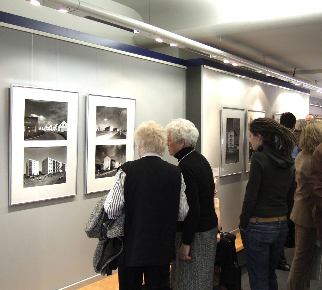 Ausstellungseröffnung von Bildern von Hans Schafgans Aufnahme: 31.3.2006 Url